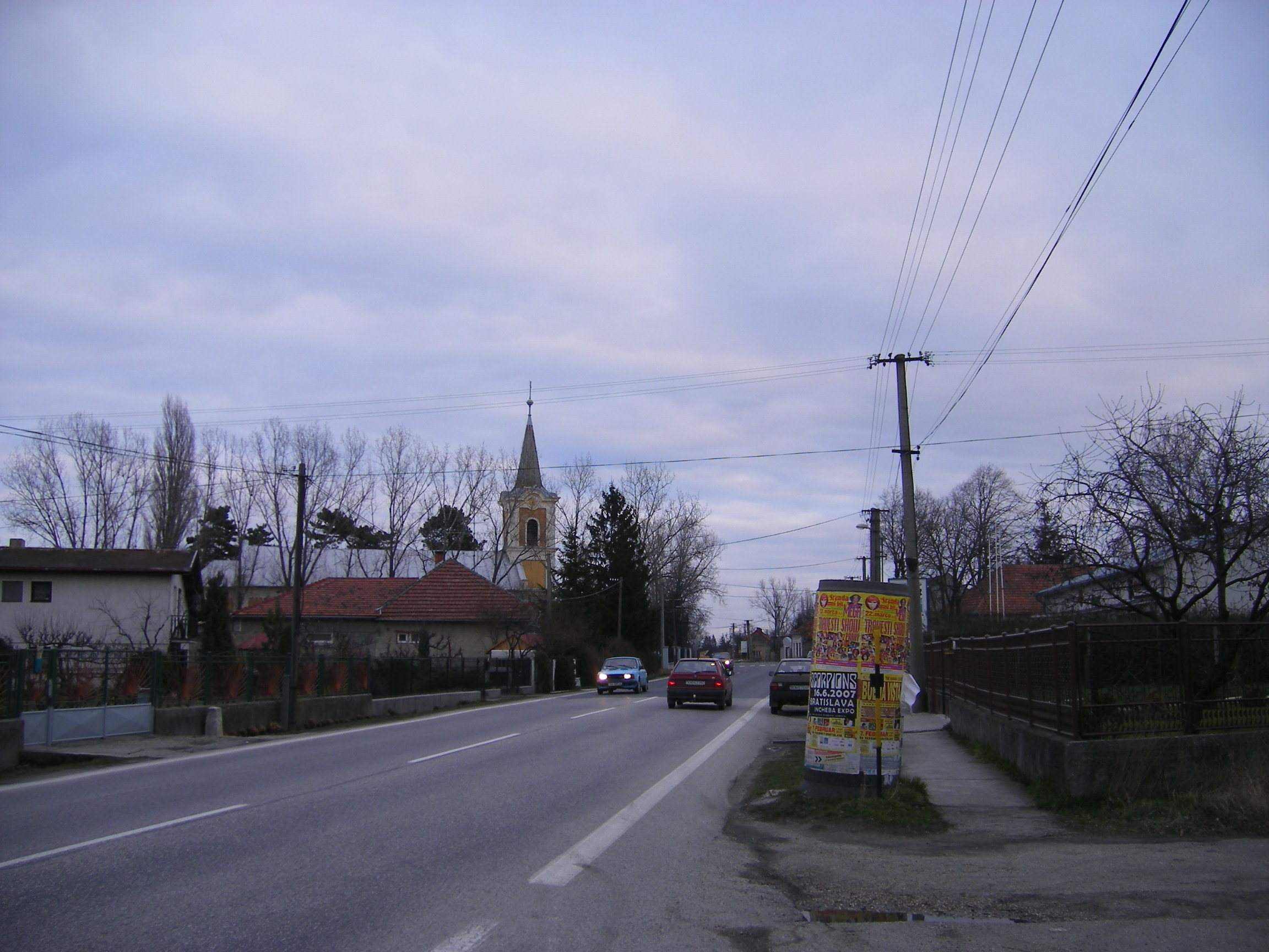 Komárom/Őrsújfalu - Fő utca